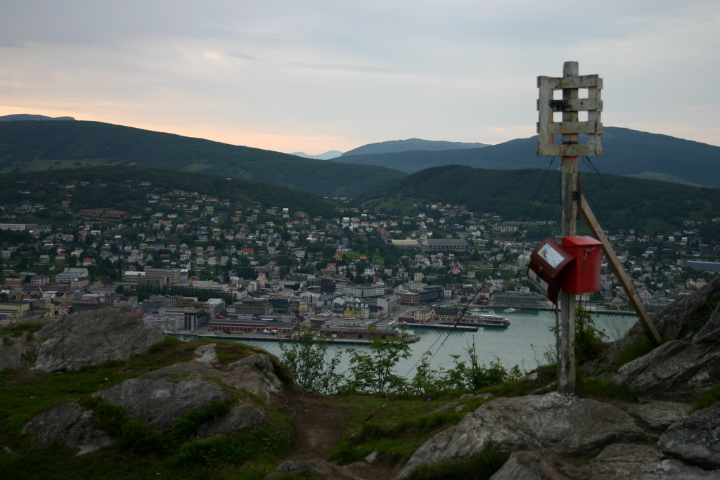 Gangsås: Utsikt over Harstad fra Gangstoppen.